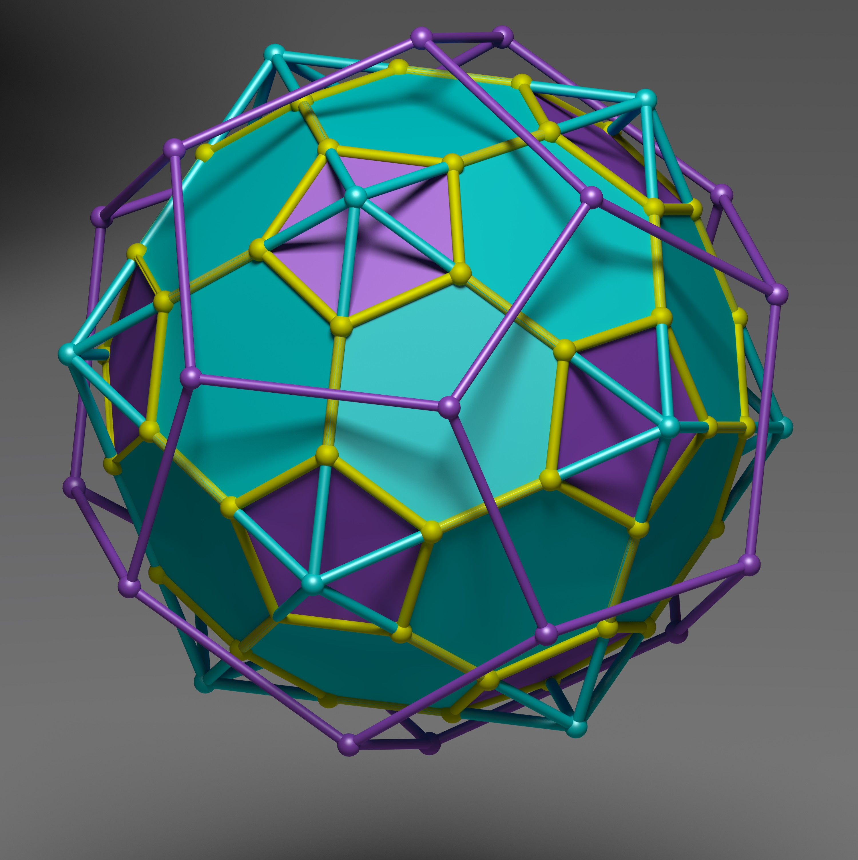 Ikosaederstumpf mit Seitenkanten